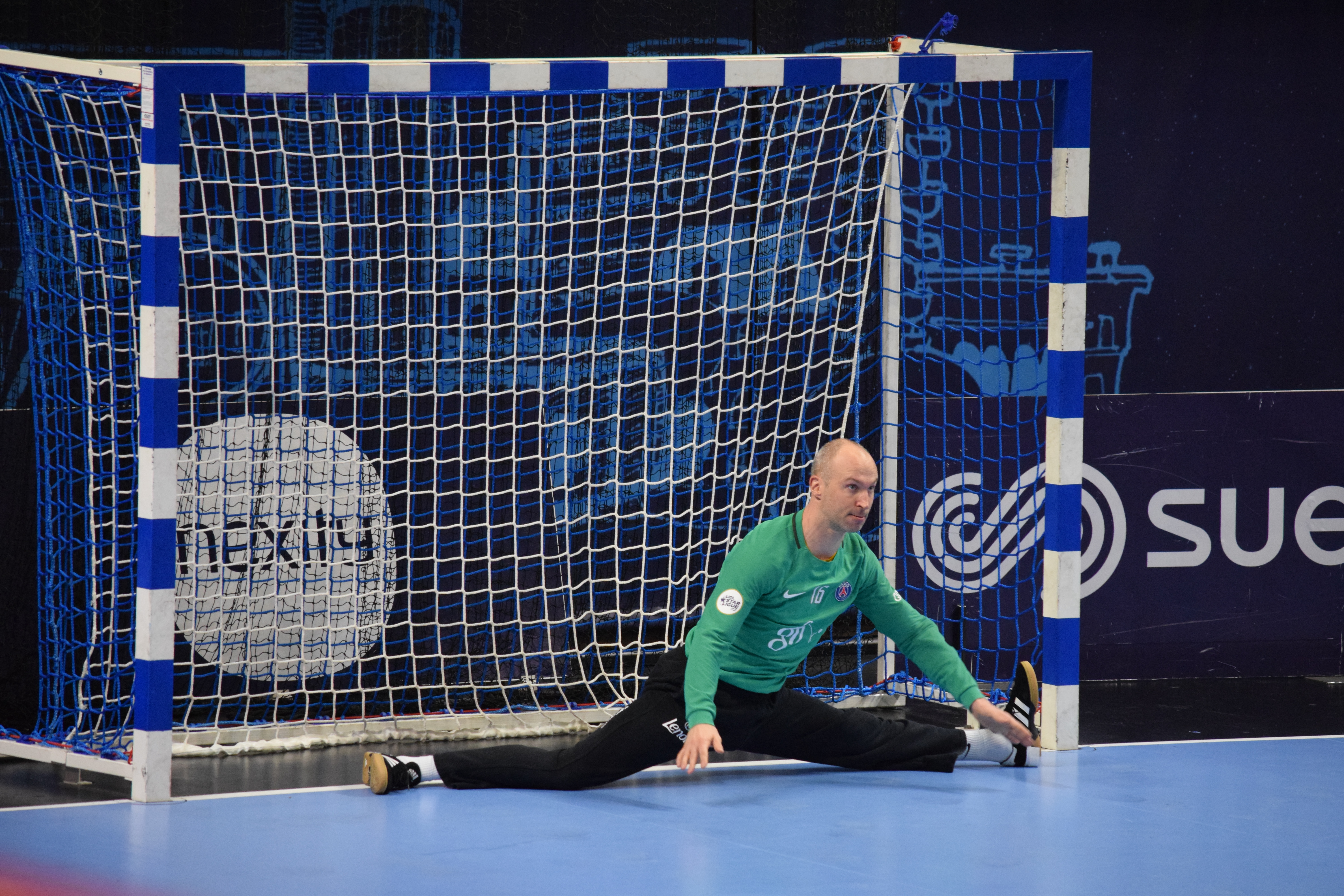 Match de la 16e journée de Lidl Star Ligue de Handball, saison 2016-17 - 1er mars 2017